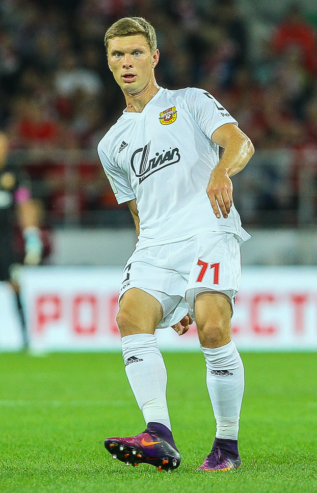 «Спартак» - «Арсенал»